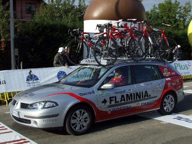 Piąty etap 64. Tour de Pologne: Września - Świdnica Licensing: This image or multimedia was created by Bartosz Senderek. The image or audio is licensed under CC-BY license. Attribution to me is required. Licencja: Ten obrazek lub plik multimedialny został stworzony przez Barotsza Senderka. Został on udostępniony na licencji CC-BY. Informacja o moim autorstwie jest wymagana. "I want to use the image/multimedia. How can I do that?" You can use this image/multimedia freely for any purpose, including commercial use, provided that you license it under the above license. My suggestion is to use text shown below: If you use the image I would appreciate it if you would let me know on my talk page, but this is not required as long as you follow the above license. "Chcę użyć tego pliku. Jak mogę to zrobić?" Możesz używać tej grafiki/multimediów darmowo w każdym celu, włączając użycie komercyjne, udostępniając go dalej na powyższej licencji. Jeśli zdecydujesz się na publikację zdjęcia mojego autorstwa obowiązkowo podpisz go w sposób podany w sekcji "Licensing text". Jeżeli użyłeś mojego pliku możesz powiadomić mnie o tym na mojej stronie dyskusji, lecz nie jest to wymagane, dopóki trzymasz się powyższej licencji.